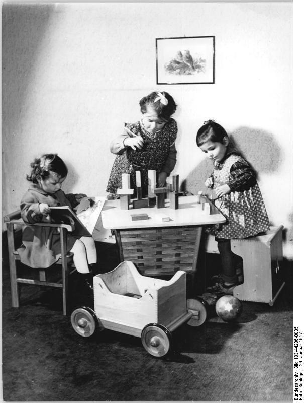 Stubenwagen, Fahrgestell, spielende Kinder Zentralbild Schlegel 24.1.1957 Neue Kinderecke von der Firma Flemming aus Globenstein. Von der Privatfirma Flemming KG in Globenstein /Ergeb. wird eine Kinderecke hergestellt, zu der ein Stubenwagen, eine Tischtruhe, sowie ein Kinderfahrstuhl gehören. Diese Einrichtungsgegenstände können zerlegt und in Teilen zu anderen Zwecken verwendet werden. Wird z.B. voom Stubenwagen das Fahrgestell abgenommen, so kann er als Wiege benutzt werden, während die Räder mit dem ursprünglichen Windkasten einen Spielkasten ergeben. Der Kasten kann auch als Fußbank dienen. Der Korb, in dem das Kleinkind liegt, kann als Wäschekorb verwendet werden. Für die Konstruktion der Kinderecke erhielt die Firma, Flemming KG in Globenstein ein Diplom des Ministeriums für Handel und Versorgung. In ihm wird besonders die Erweiterung des Sortiments und die Einsparung von Rohstoffen hervorgehoben, die durch diese Kombination erreicht wird. UBz: Blick in die Spielecke. Im Vordergrund der Spiekastenwagen, das ehemalige Fahrgestell des Stubenwagens.